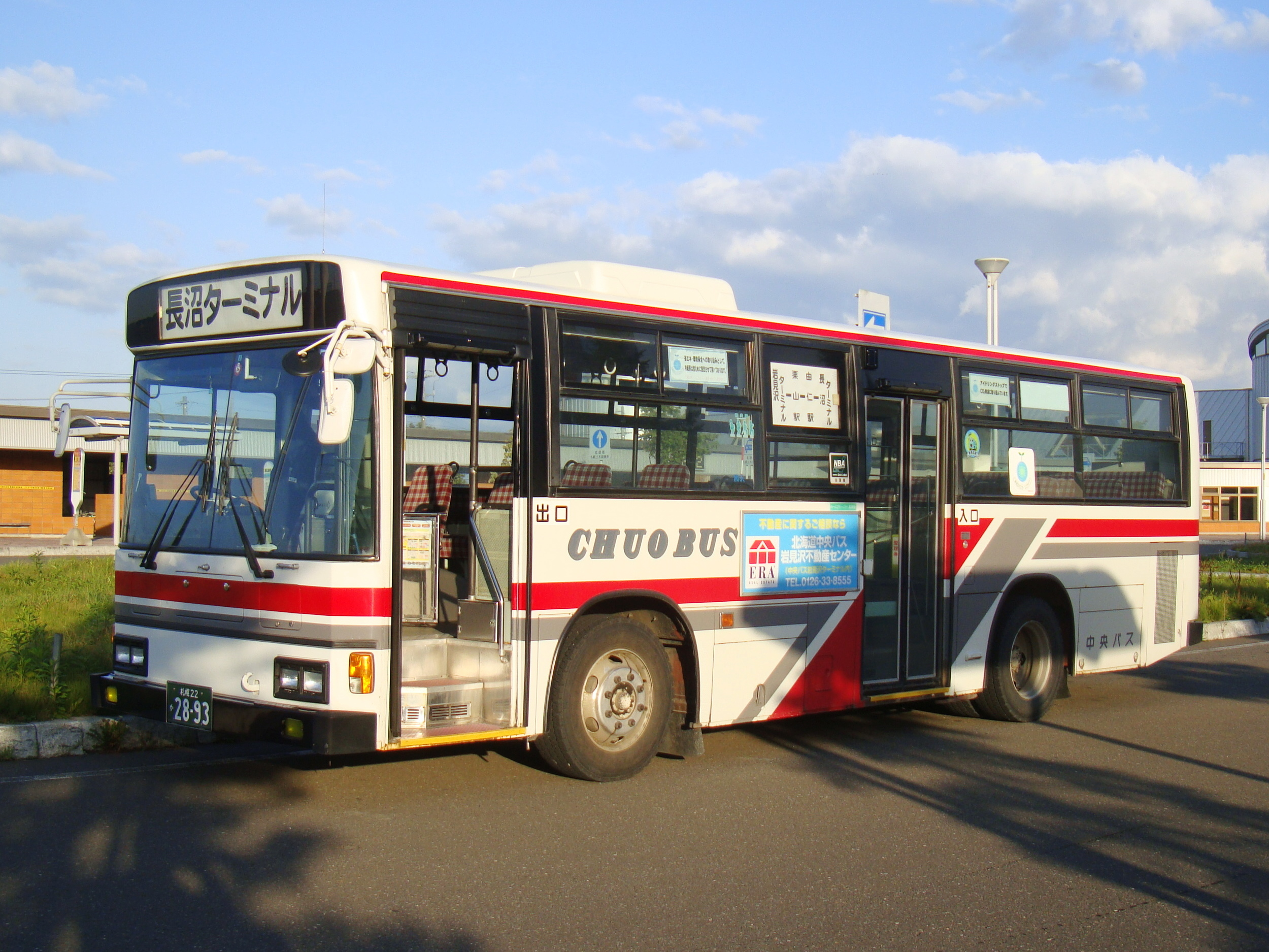 Kuriyama to Naganuma